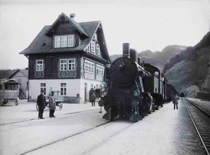 Bahnhofgebäude Brunnadern mit einem von einer Dampflokomotive gezogenem Güterzug. Rechts steht ein Postauto der Linie St. Peterzell–Brunnadern. Im Hintergrund ist das Ostportal des Wasserfluhtunnels erkennbar.